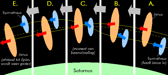 ヤヌスとエピメテウスの軌道. ヤヌスとエピメテウスの軌道の交換。互いに接近するタイミングでお互いの軌道を入れ替える。.